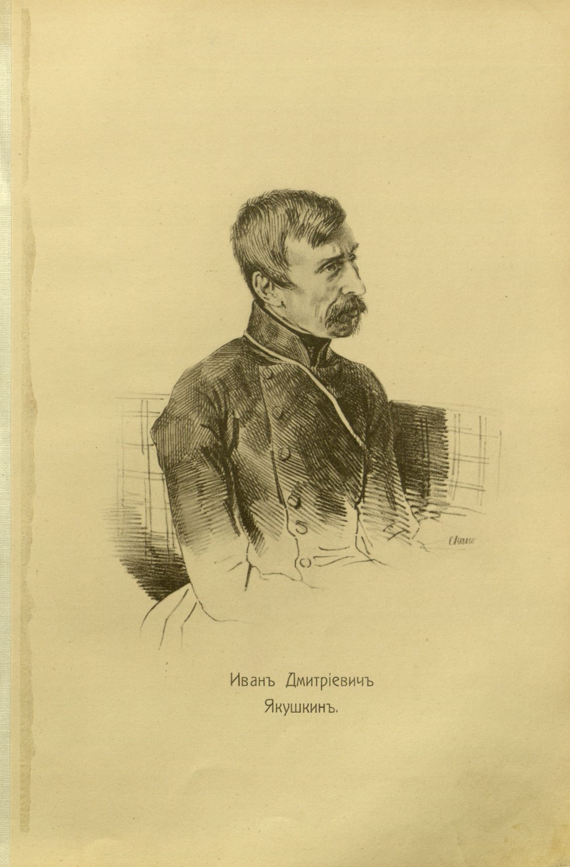 Yakushkin Ivan Dmitriyevich